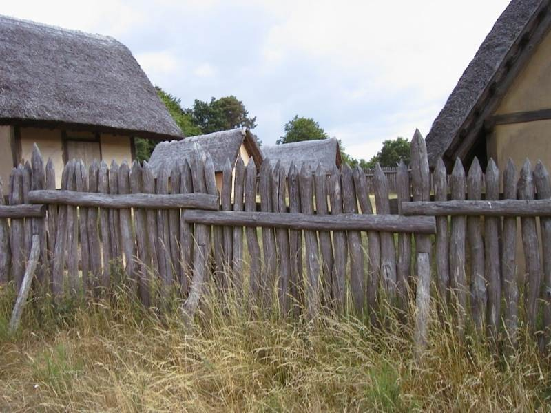 Keltische Burganlage "Altburg" bei Bundenbach im Hunsrück. Selbst fotografiert, gemeinfrei